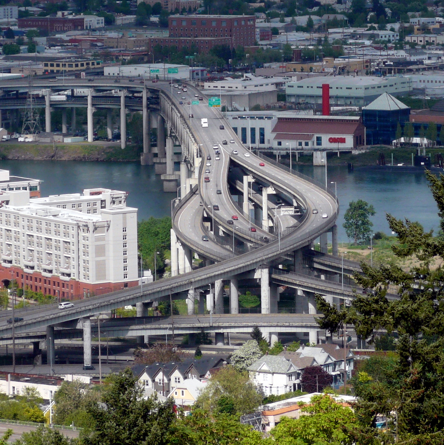 Portland